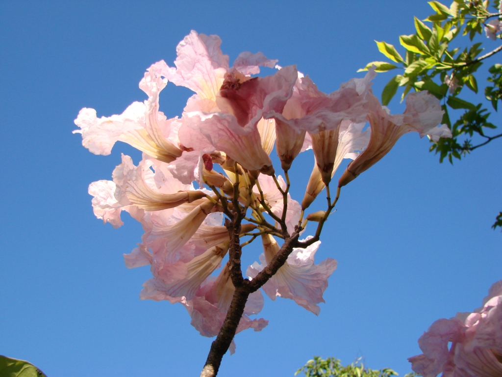 Tabebuia heptaphylla (= Handroanthus heptaphyllus) - BIGNONIACEAE Parque da Cidade - Brasília - Distrito Federal - Brasil.